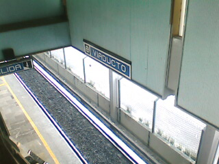 Estacion Viaducto